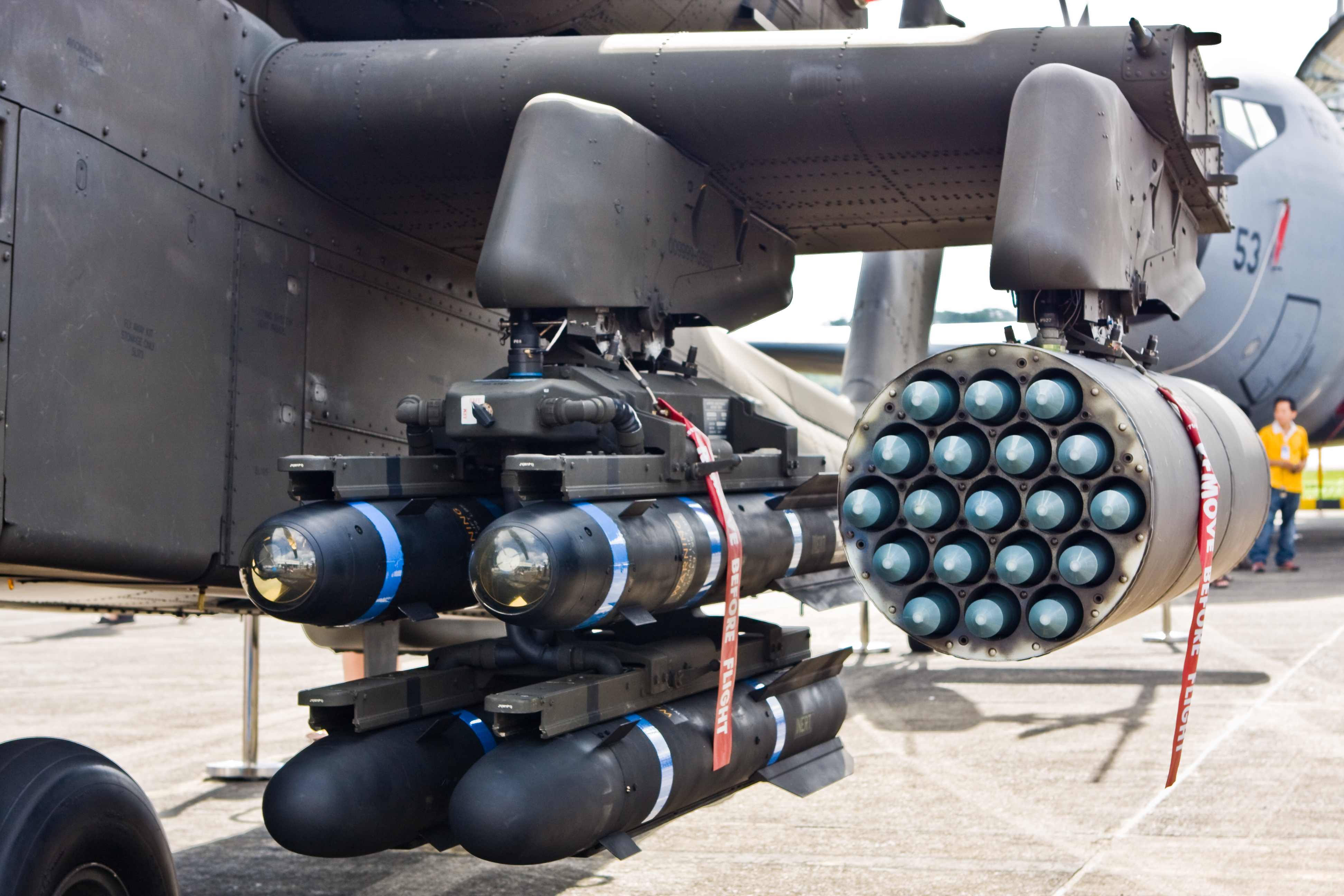 AGM-114 Hellfire Anti-Tank missiles and Hydra 70mm rockets